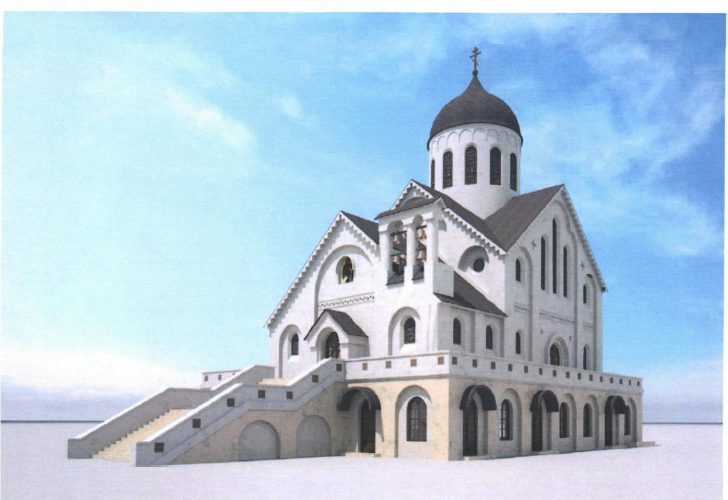 Проект храма святого благоверного князя Александра Невского Подворья Иосифо-Волоцкого монастыря в Москве